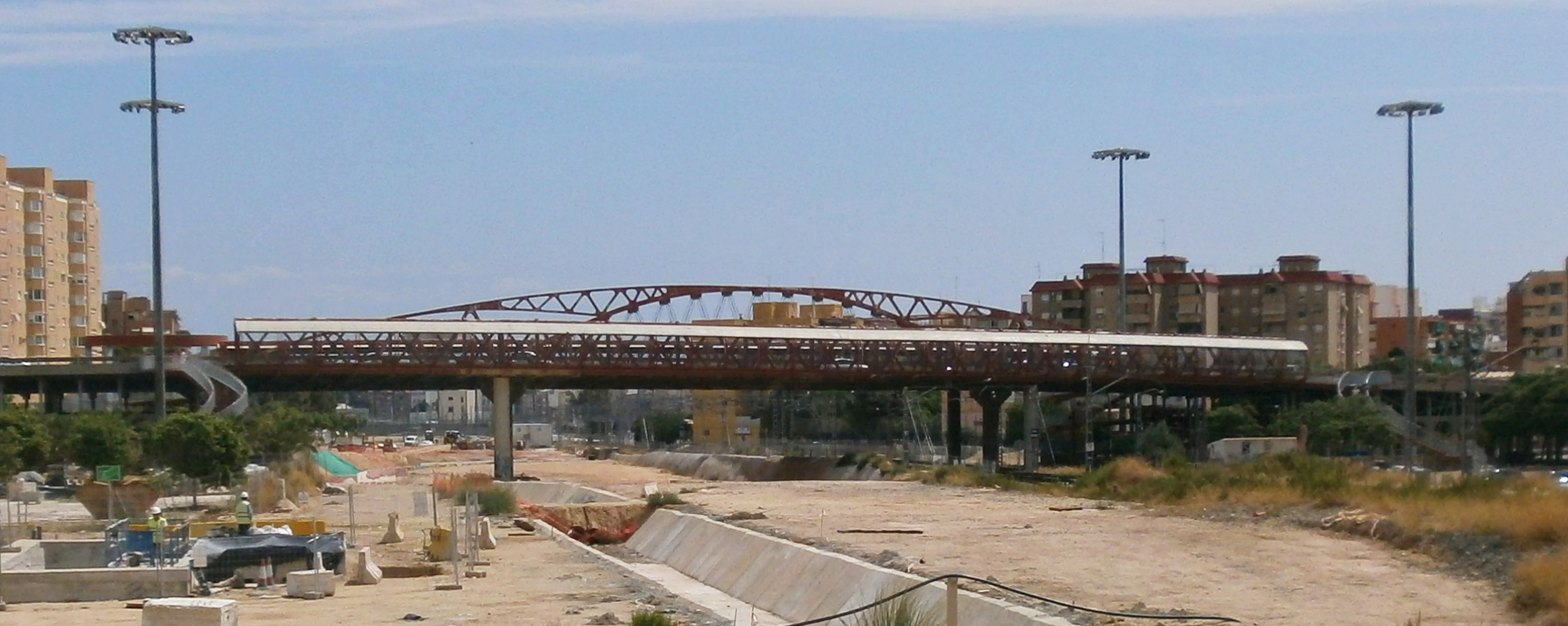 Vista del Puente del V Centenario (Puente Rojo) de Alicante, España.